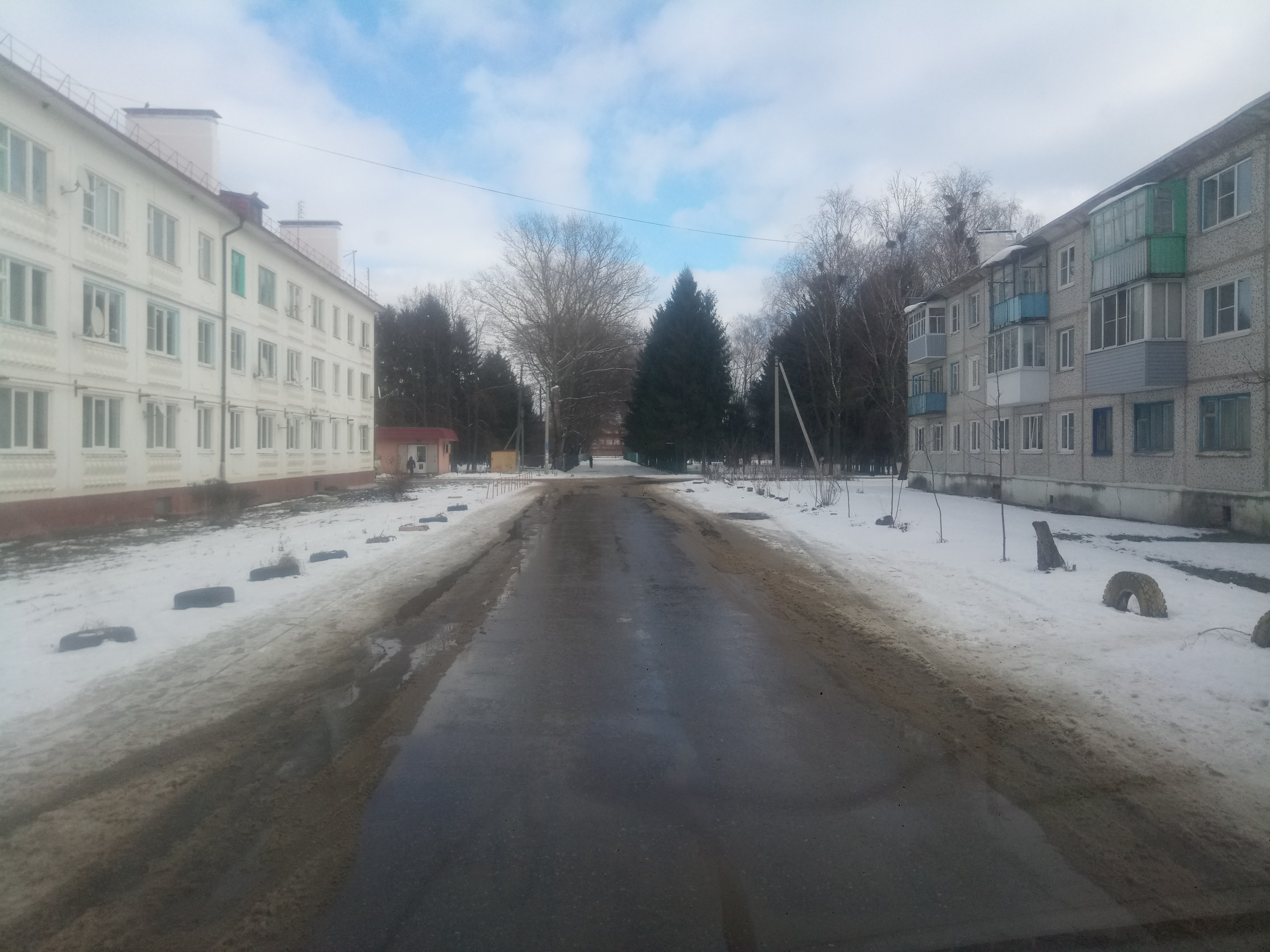 Молочные дворы